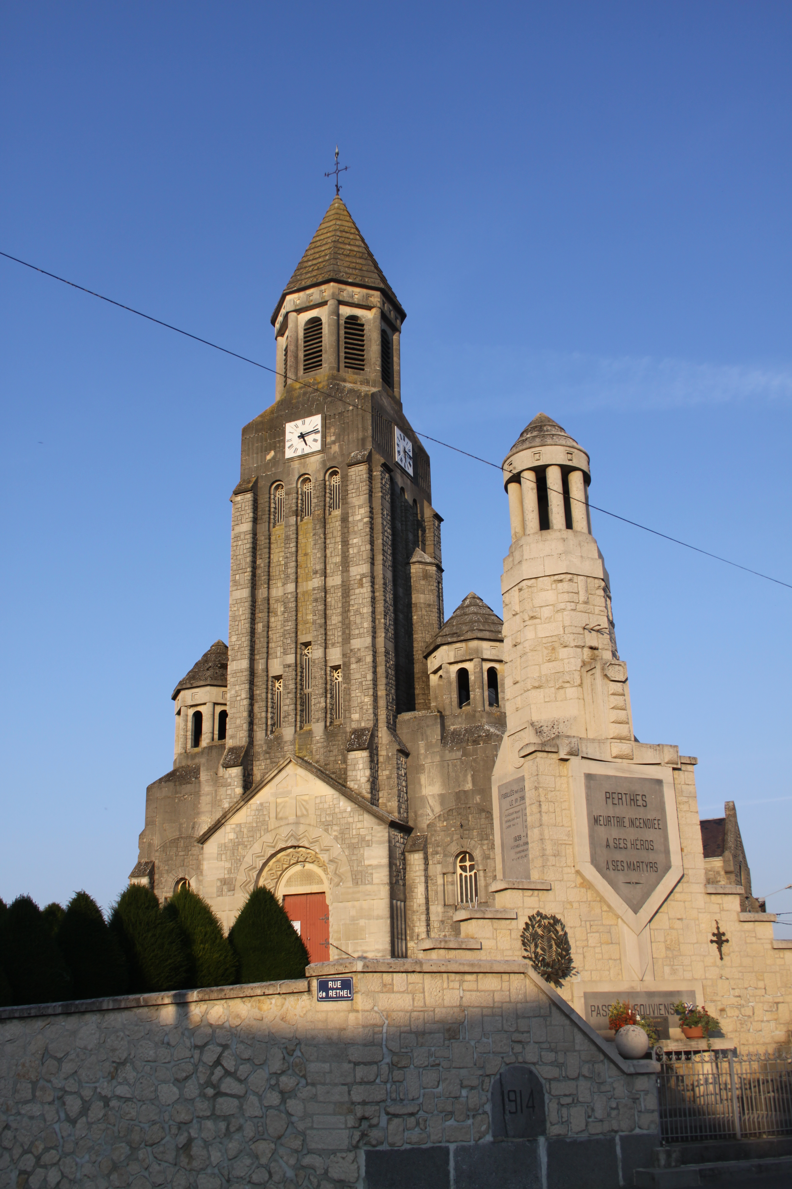 Village Ardennais